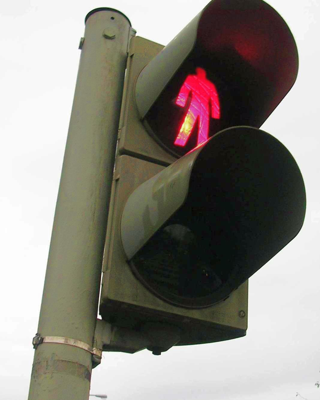 Traffic lights, Prague. Světelné signály, Praha-Strašnice, Skalka (křižovatka Na Padesátém - Vyžlovská). Signál Stůj pro chodce.